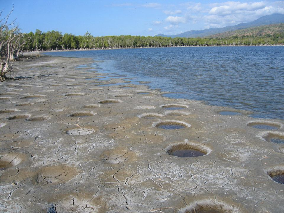 Maubarasee